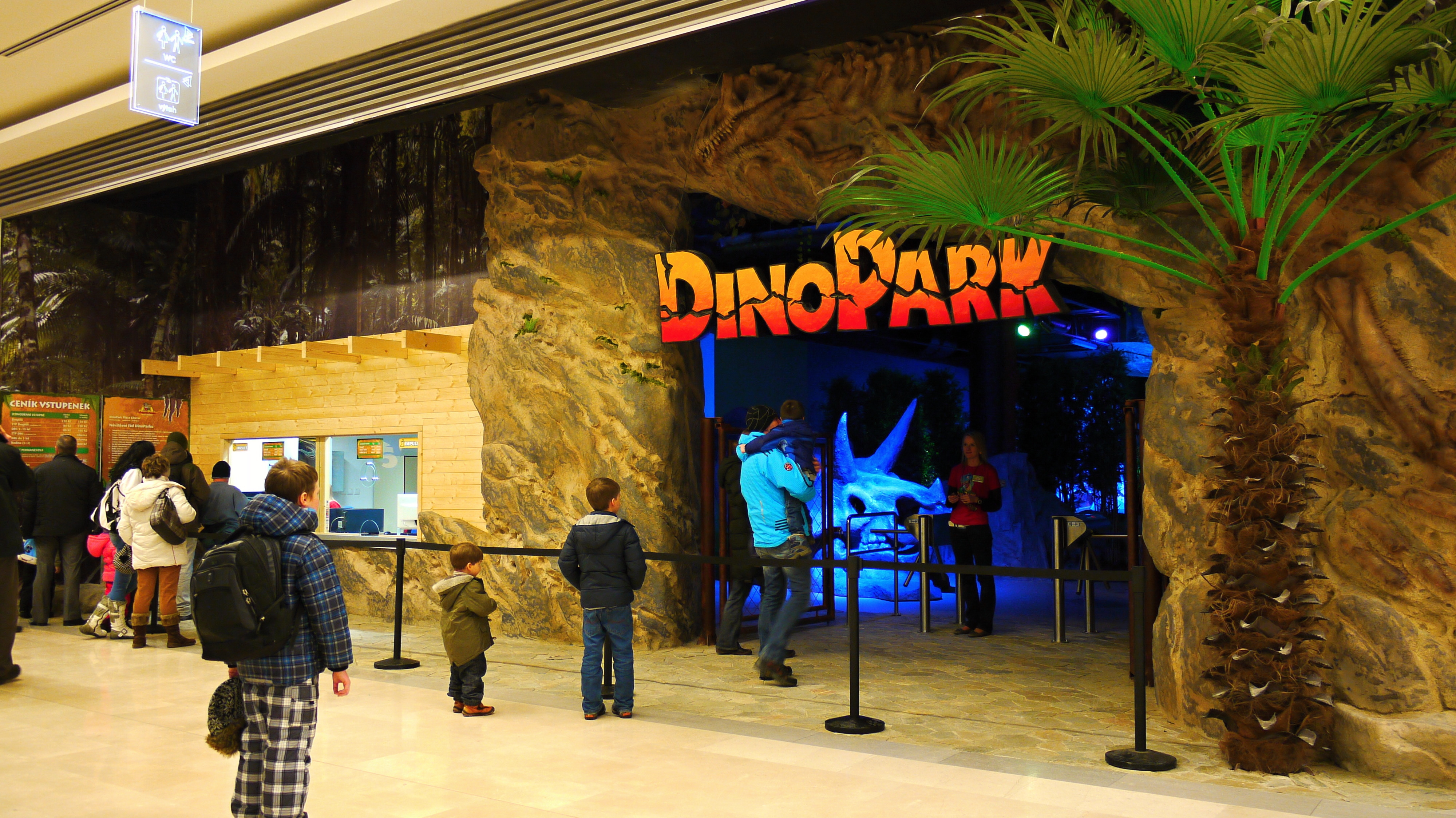 DinoPark Liberec, Vchod